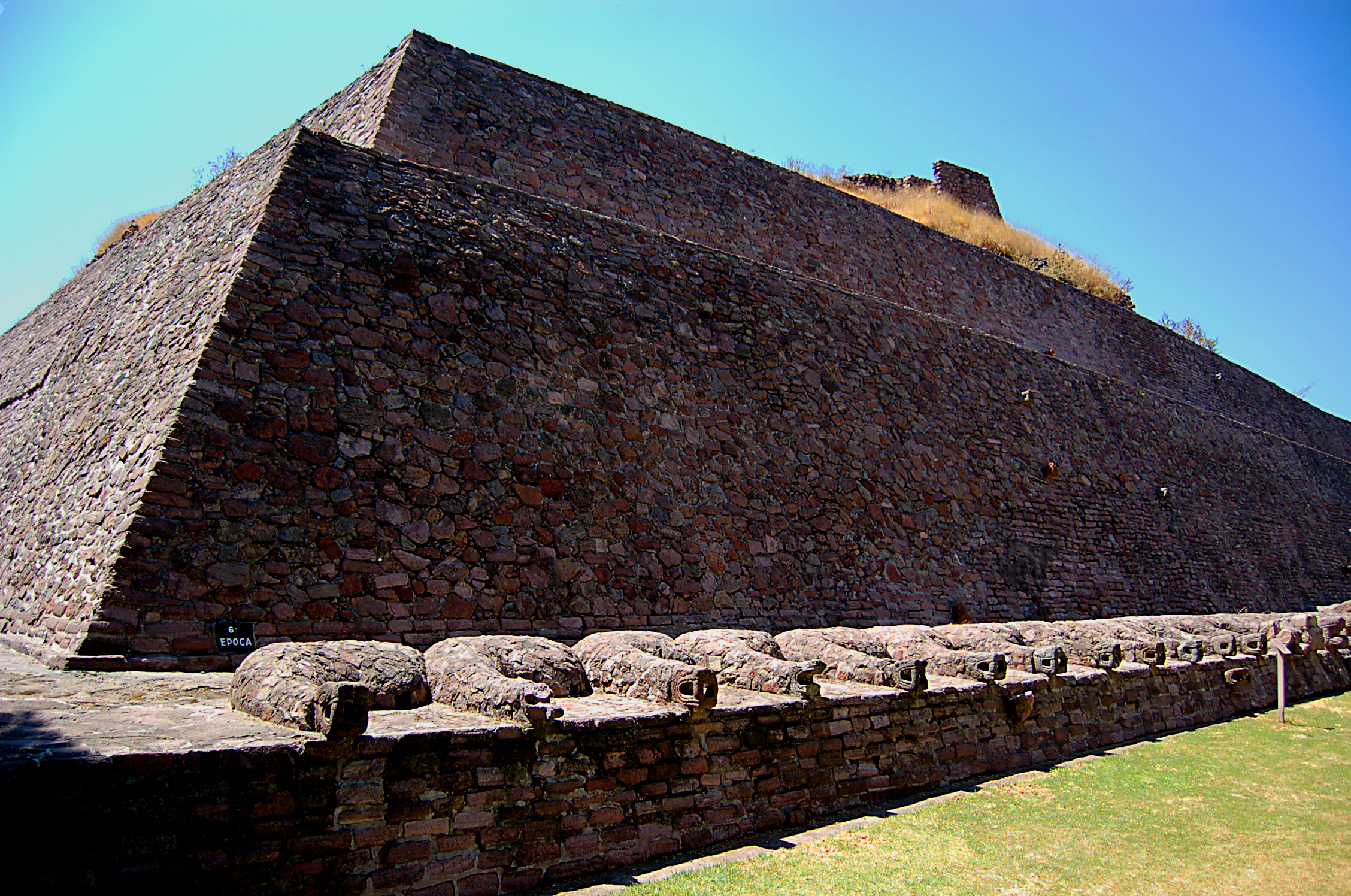 Tenayuca pyramid, Mexico